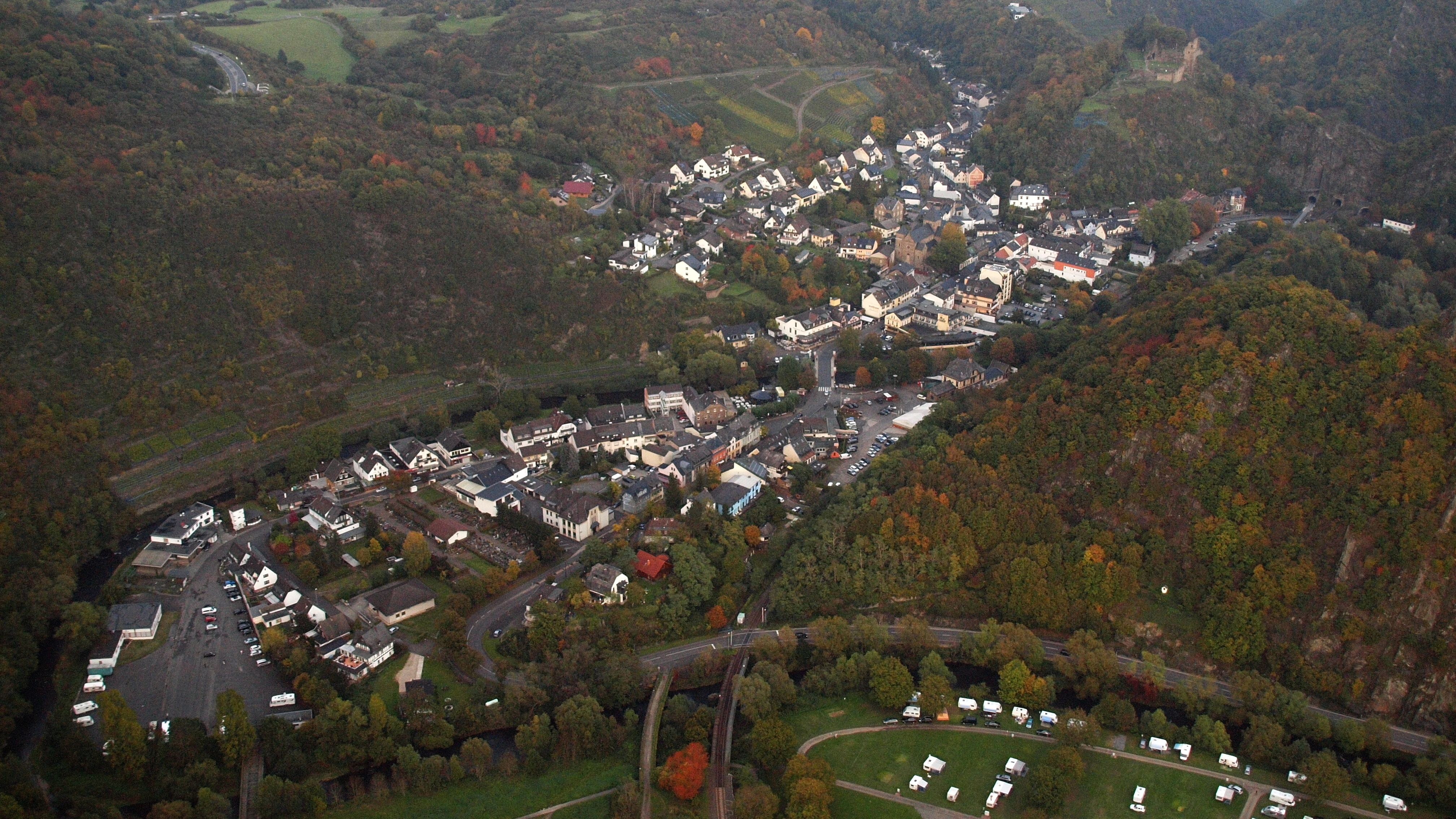 Altenahr, Luftaufnahme (2015)